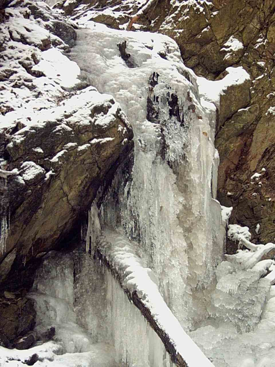 Dolní vodopád - dolní úsek pátého vodopádu v zimě